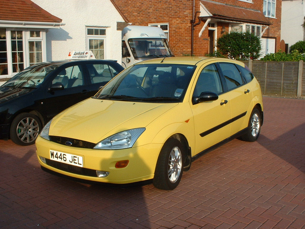 My car 2002-2006